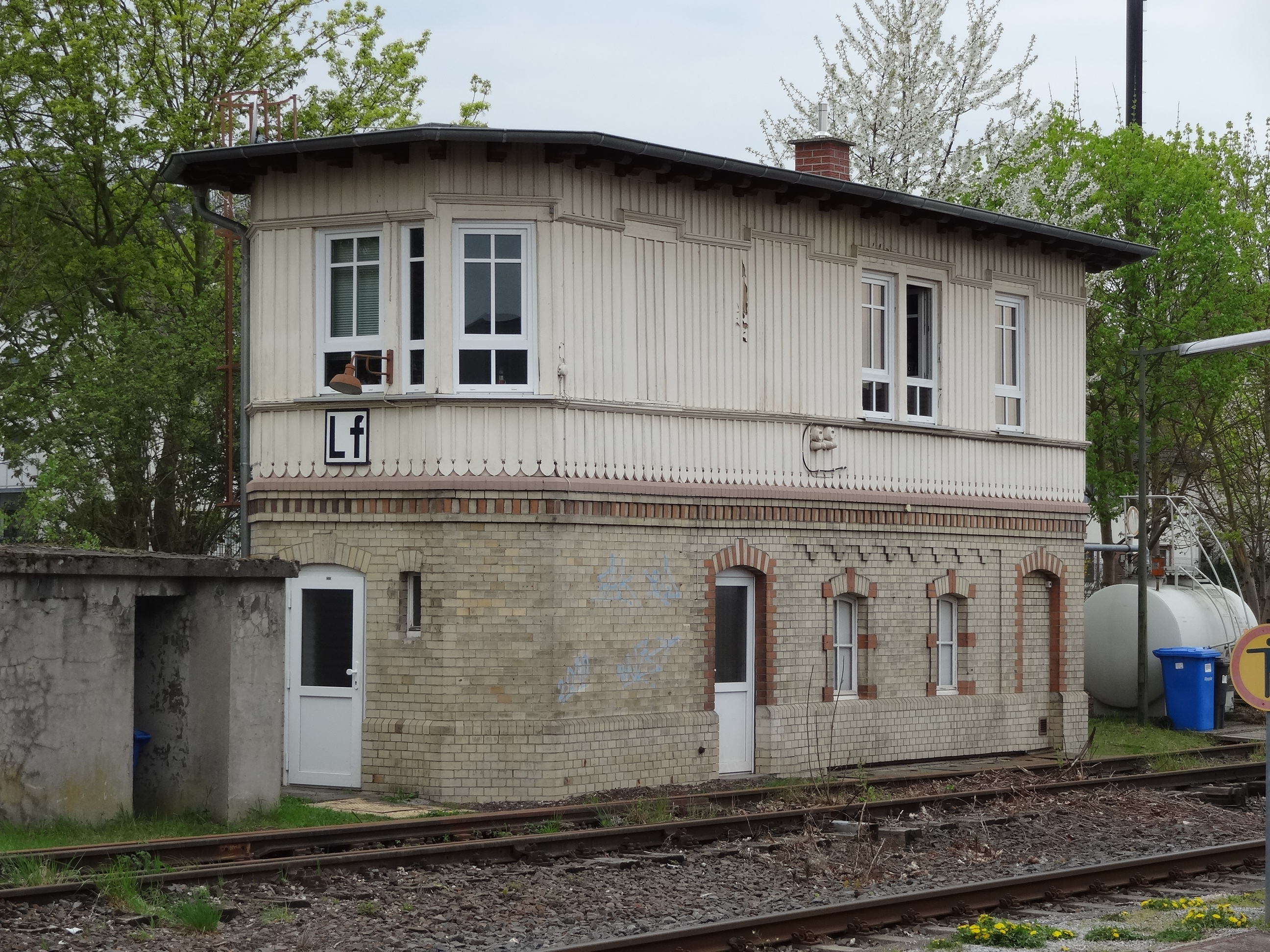 Bahnhofstraße 1 (Lich)